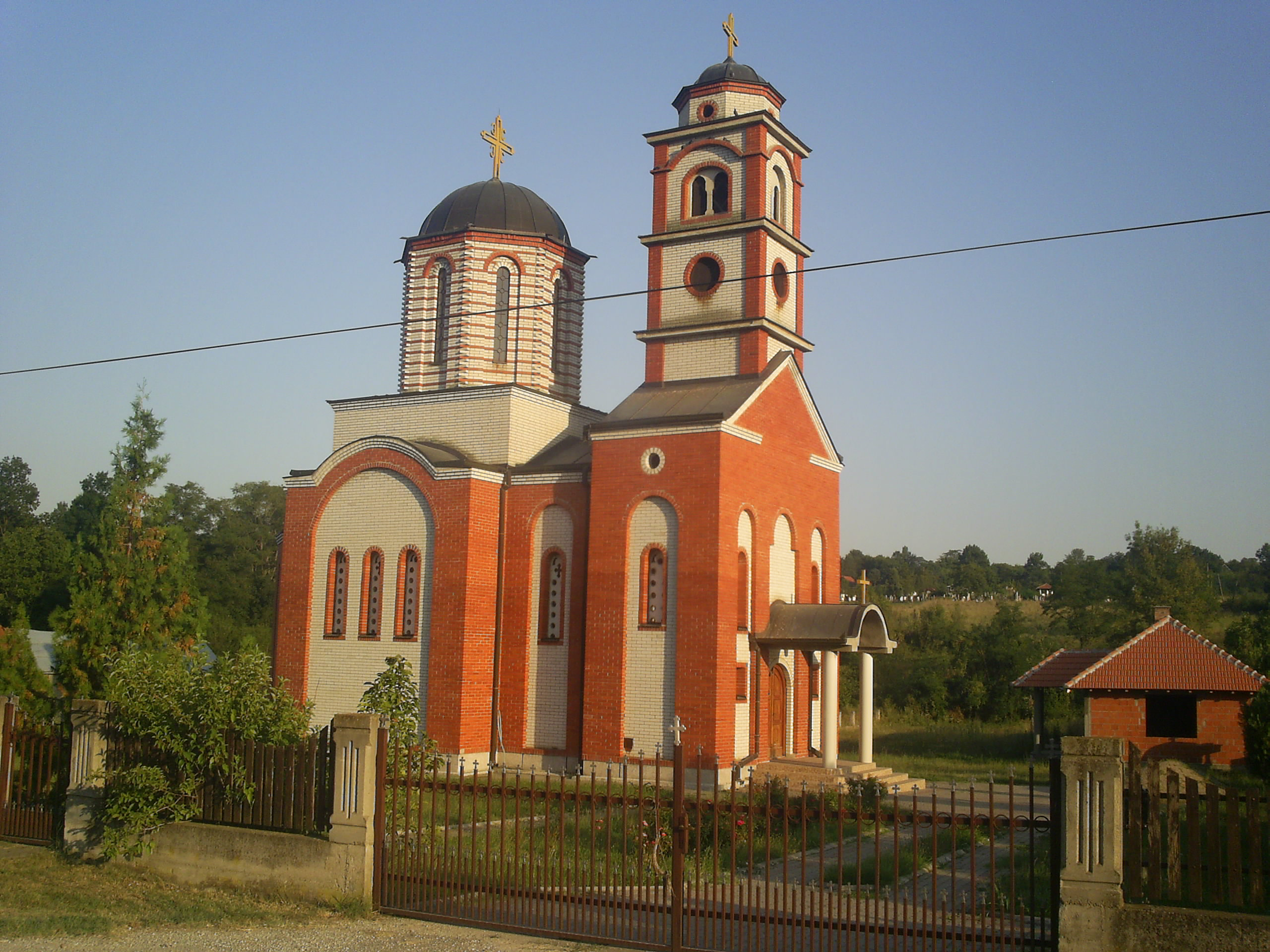 Црква у Доброводици